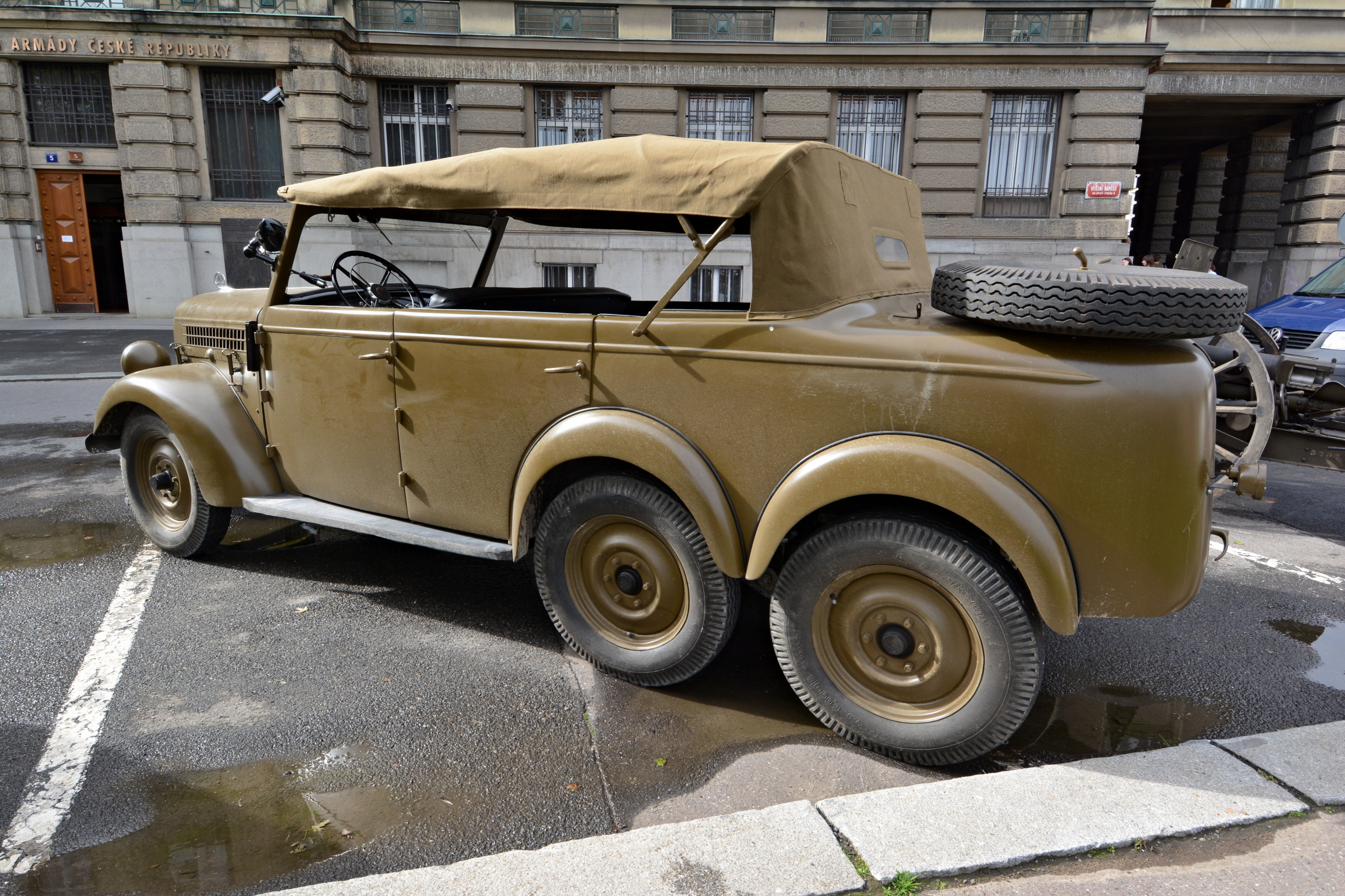 Armádní štábní autmobil Škoda 903, vyráběn v letech 1940-1942. Exponát Vojenského historického ústavu. Vystaveno 14. října 2014 při příležitosti oslav 95. výročí vzniku Generálního štábu AČR.